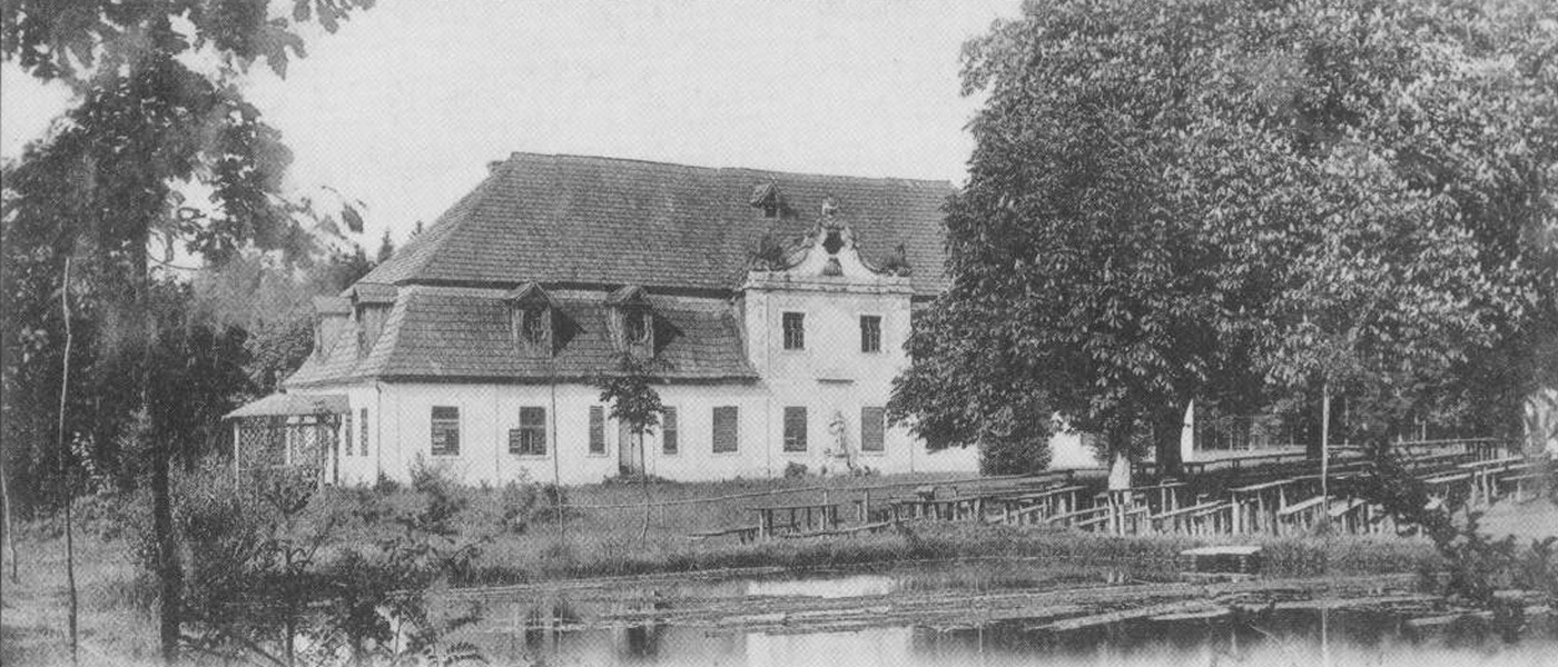 Dobový snímek loveckého zámečku Šternberk